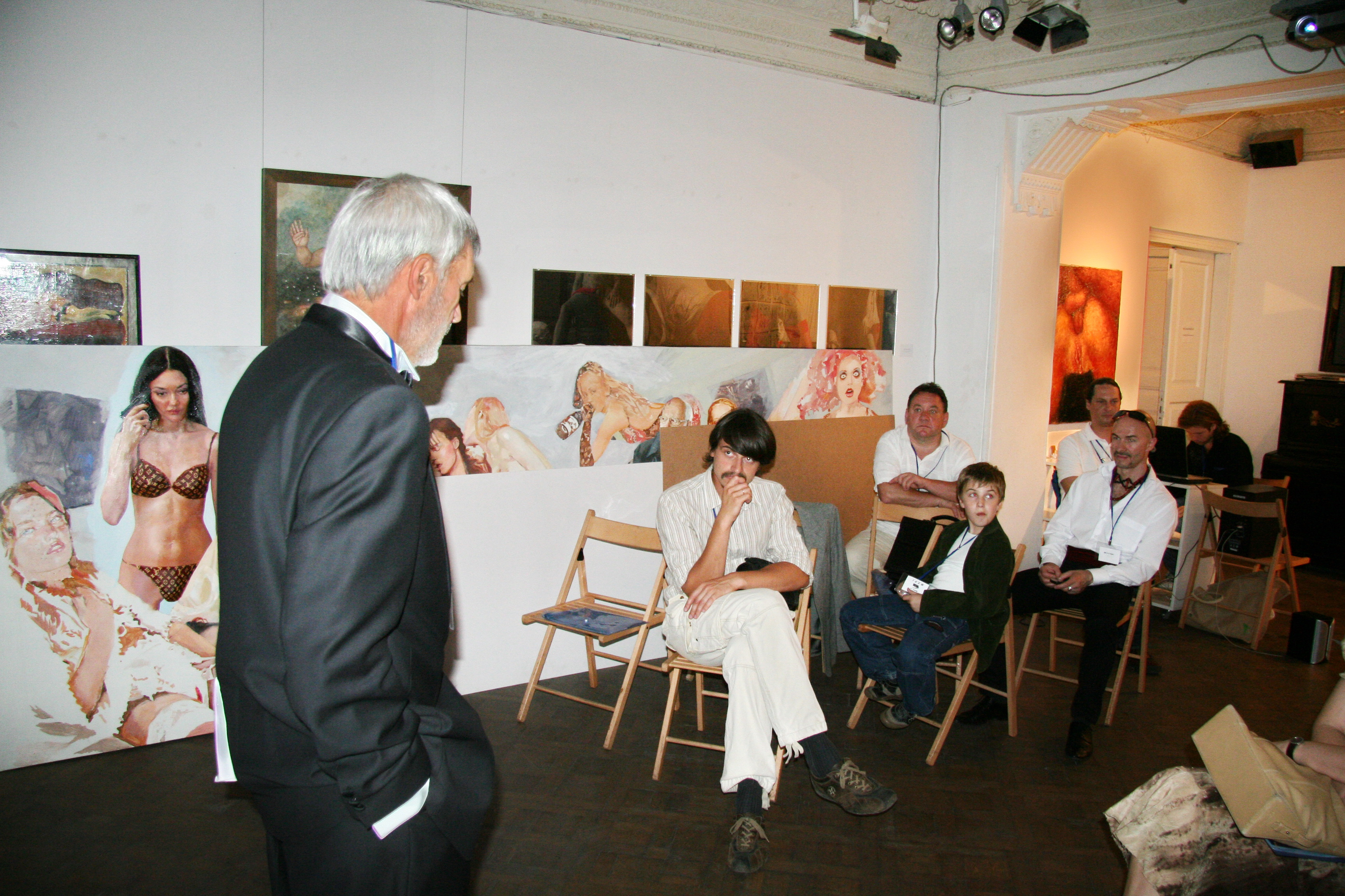 Відкрита ніч засідання 2009